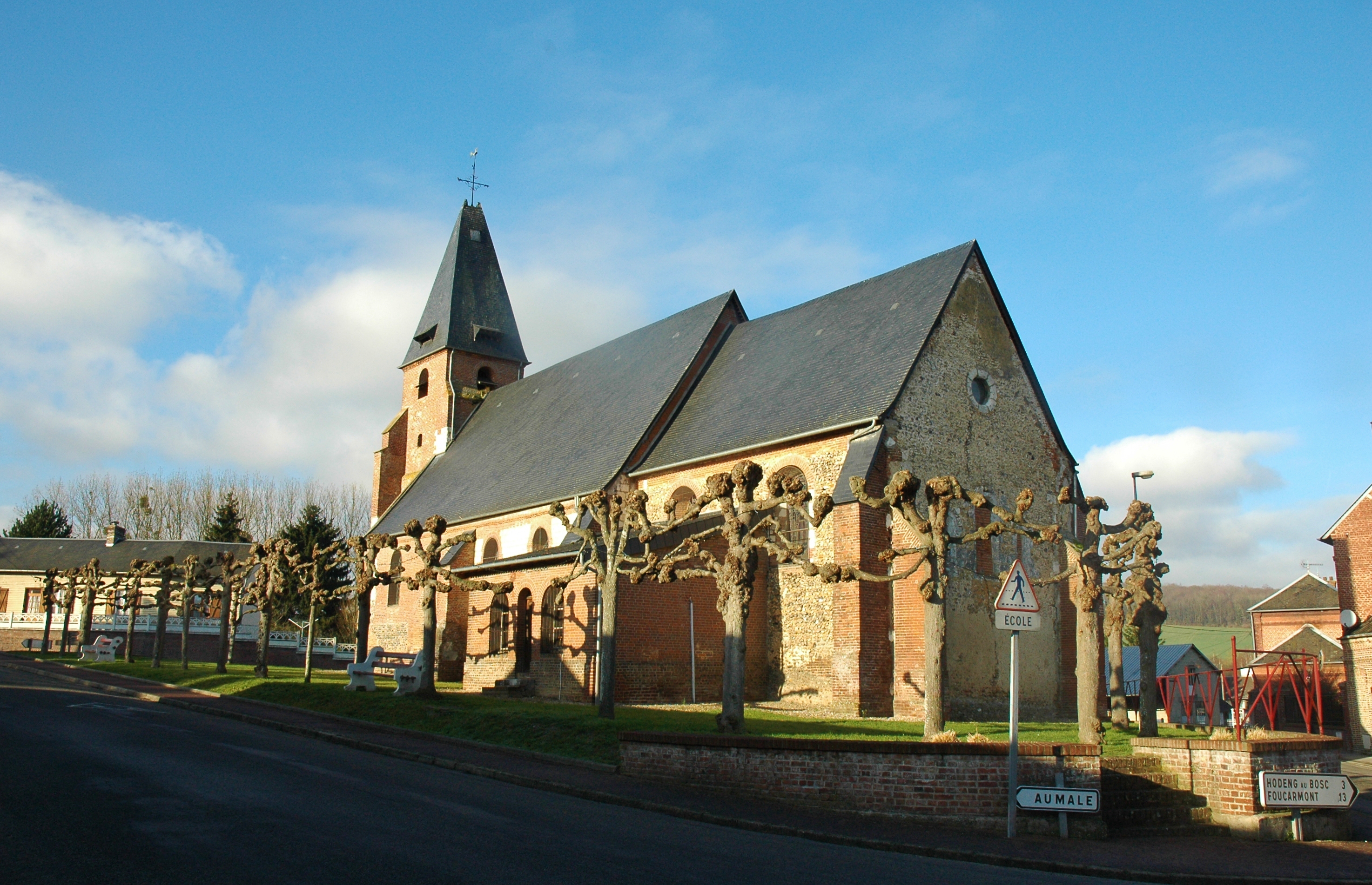 Vieux-Rouen-sur-Bresle (76), Fr, église Notre-Dame